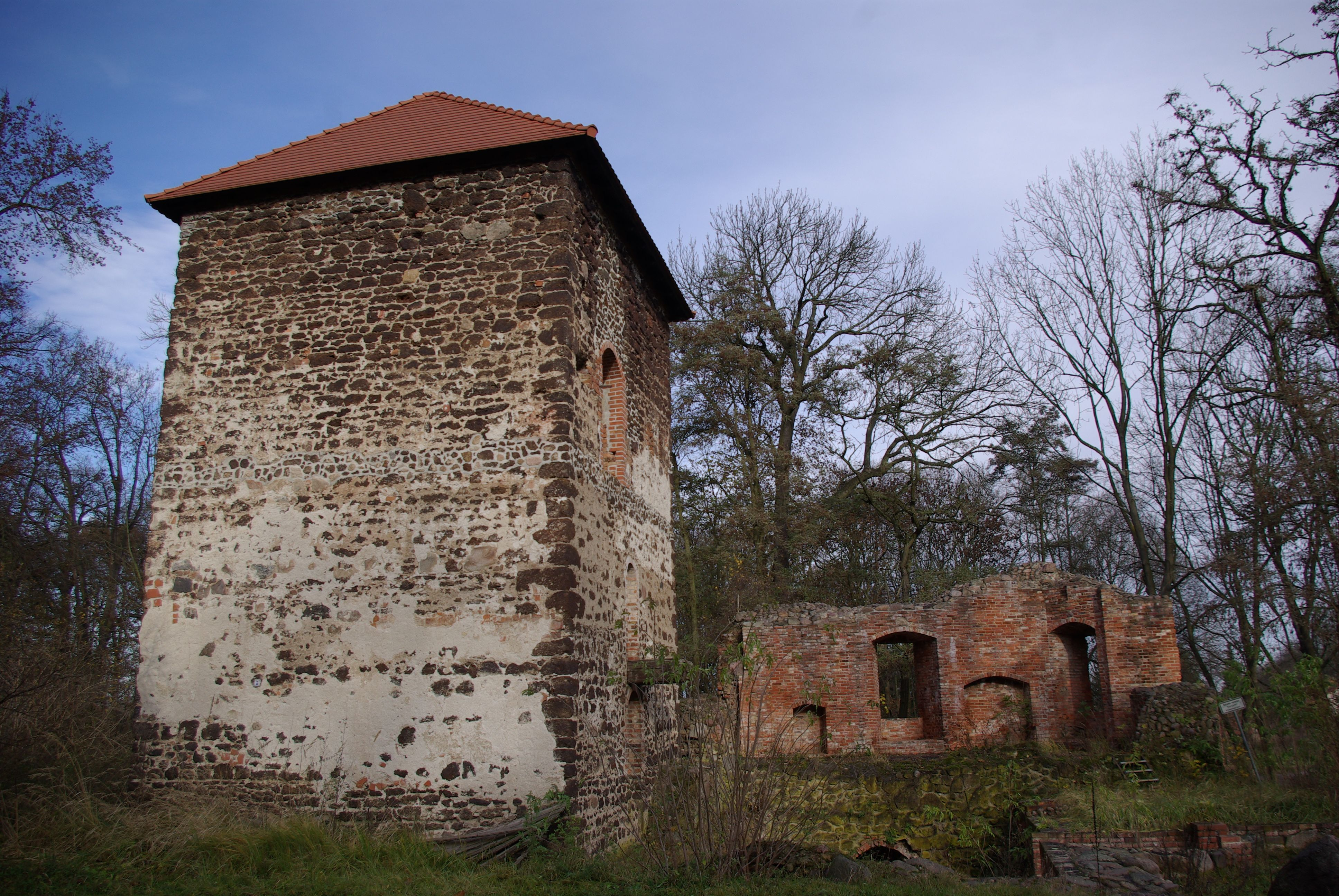 Niederer Fläming Ortsteil Bärwalde in Brandenburg. Der Turm ist der Rest der ehemaligen Burg, die sich südlich vom Ortsteil Bärwalde befindet. Der Turm steht unter Denkmalschutz.